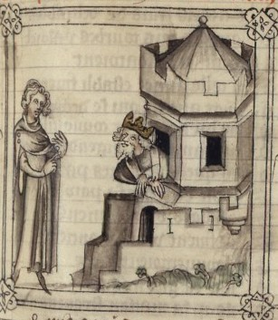 Machaut et Charles II le Mauvais